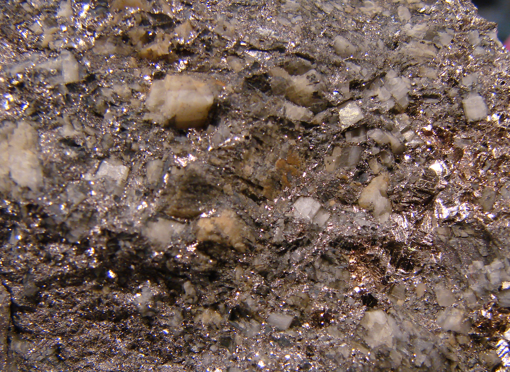 Bismuth natif. Provenance: Schneeberg, Allemagne.